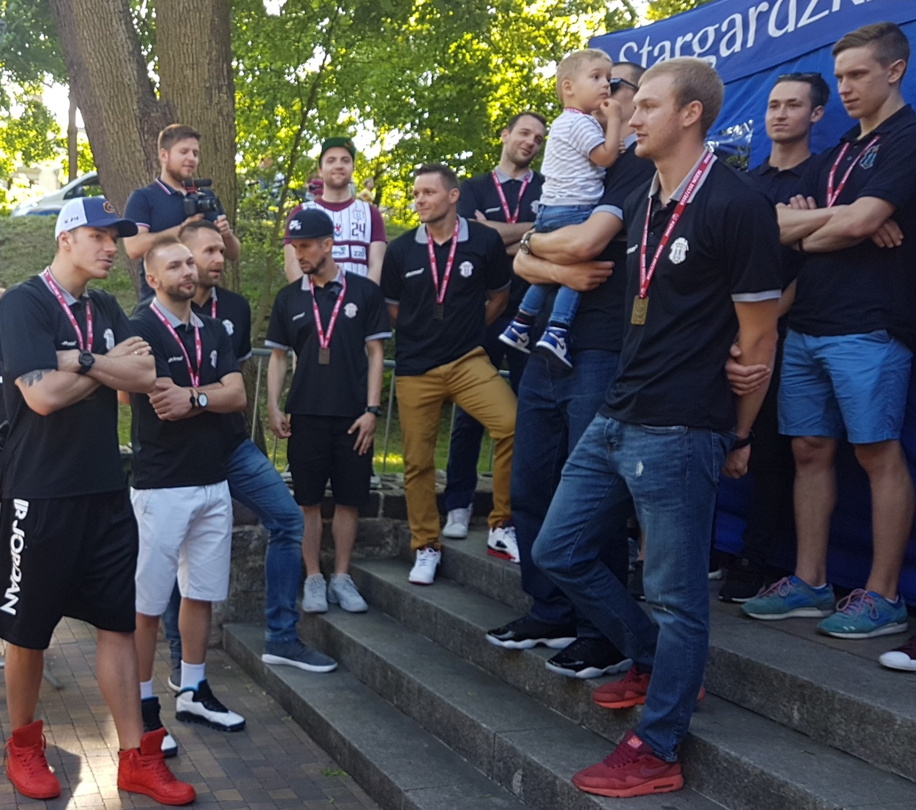 Spójnia Stargard podczas fety (19.05.2018)